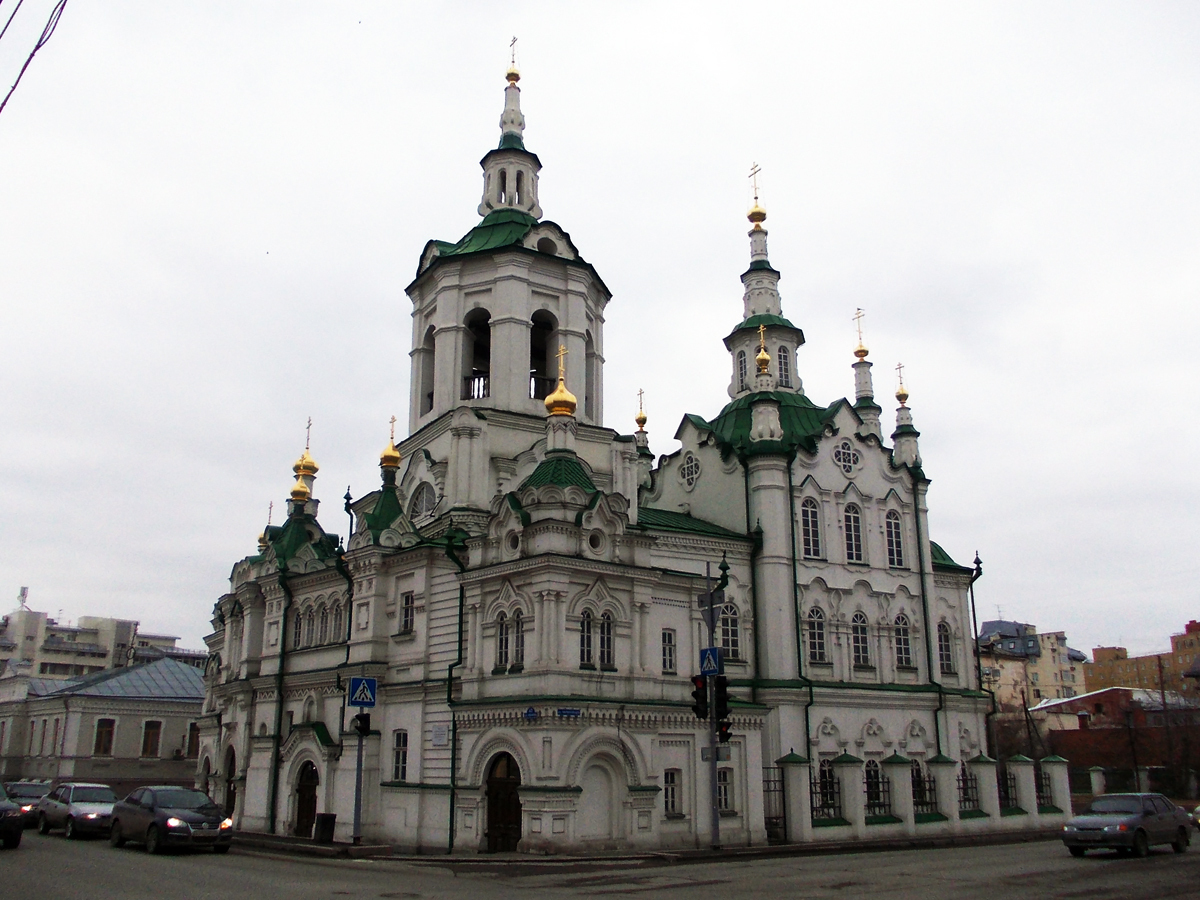 Спасская церковь (Тюмень)